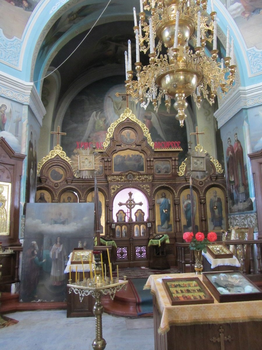 Петрыкаў. Мікалаеўская царква